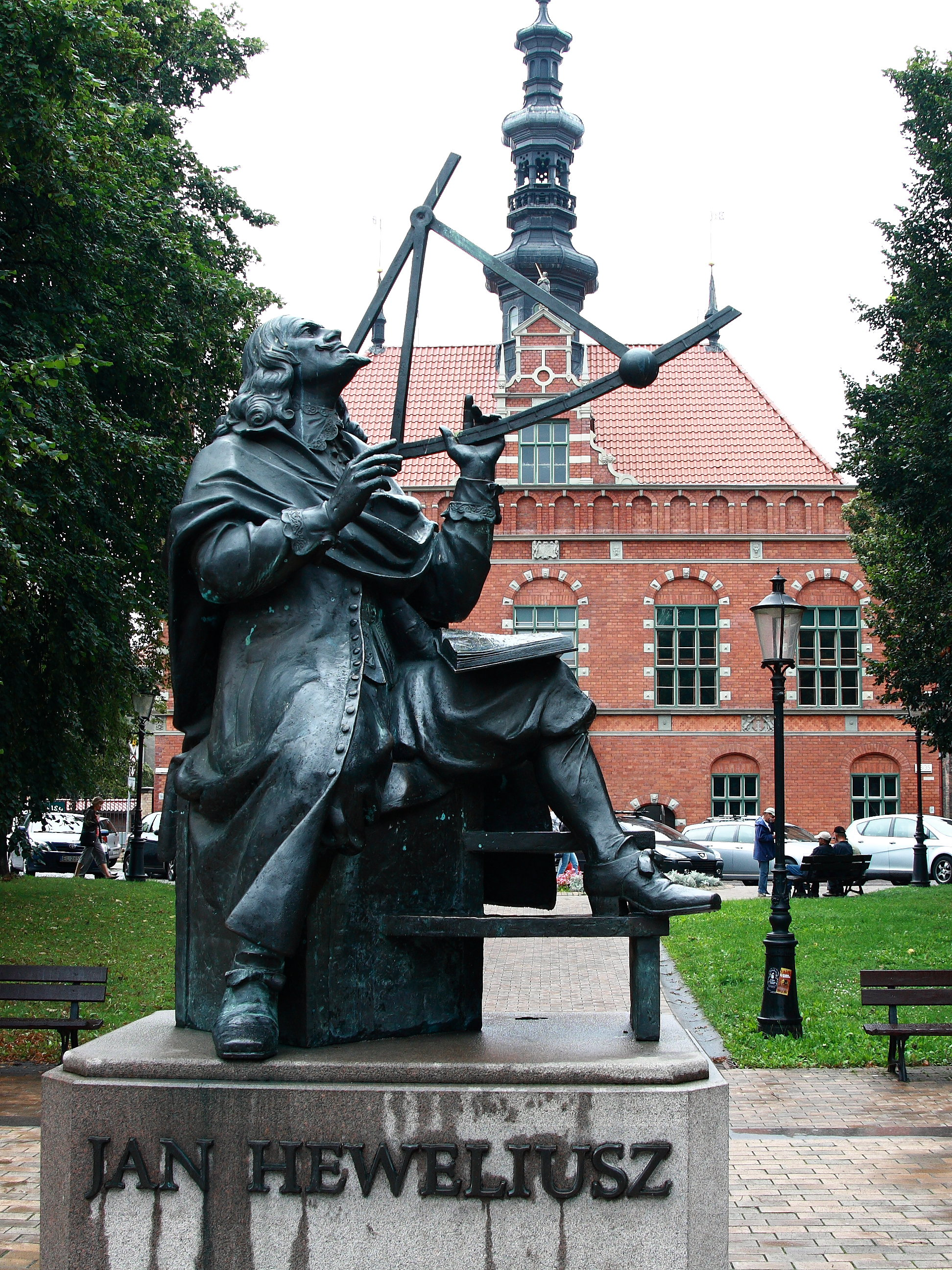 Denkmal für Johannes Hevelius in Danzig.